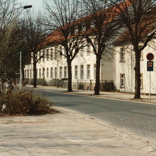 Das alte Stadtkrankenhaus von Schwedt/Oder in der Bahnhofstraße im Jahre 1994. Ansicht von Südosten. Das Gebäude wurde 1843 errichtet und 2004 abgerissen.